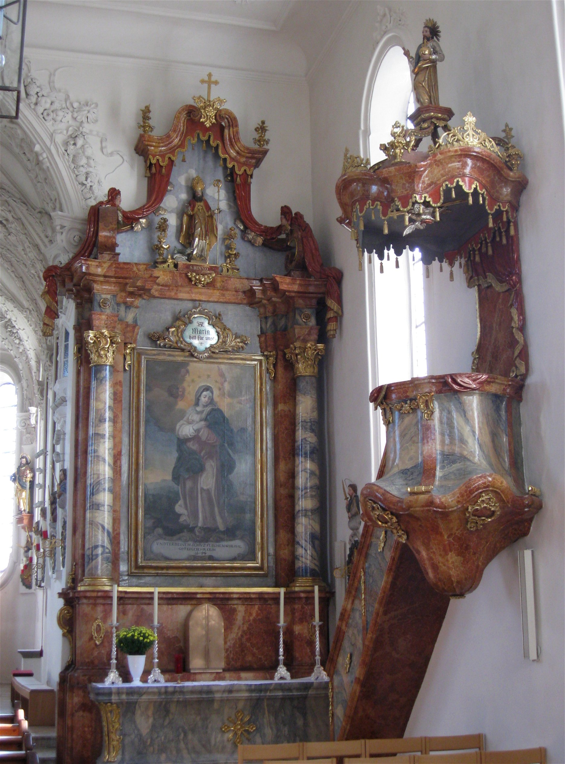 Zugspitzstraße 13. Kath. Wallfahrtskirche Hl. Blut am Wasen, Saalbau, Chor im Kern spätgotisch, 1686/87 barockisiert, Langhaus 1610/11, dem Chor um 1690 angeglichen; mit Ausstattung; Brunnenkapelle, gen. "Der Brunn", Achteckbau mit schindelgedeckter Laternenkuppel, Johann Mayr d.Ä. von der Hausstatt, Ende 17. Jh.; mit Ausstattung; nördlich neben der Kirche.